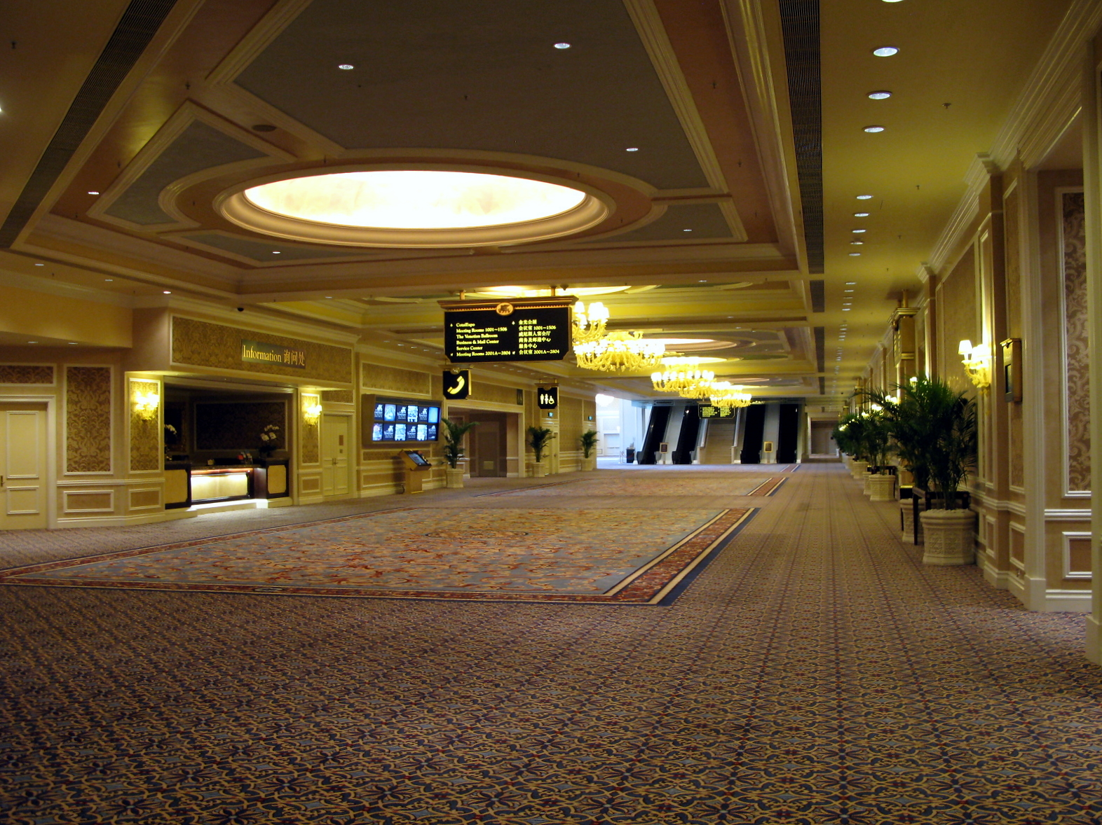 Cotai Expo Hall Lobby